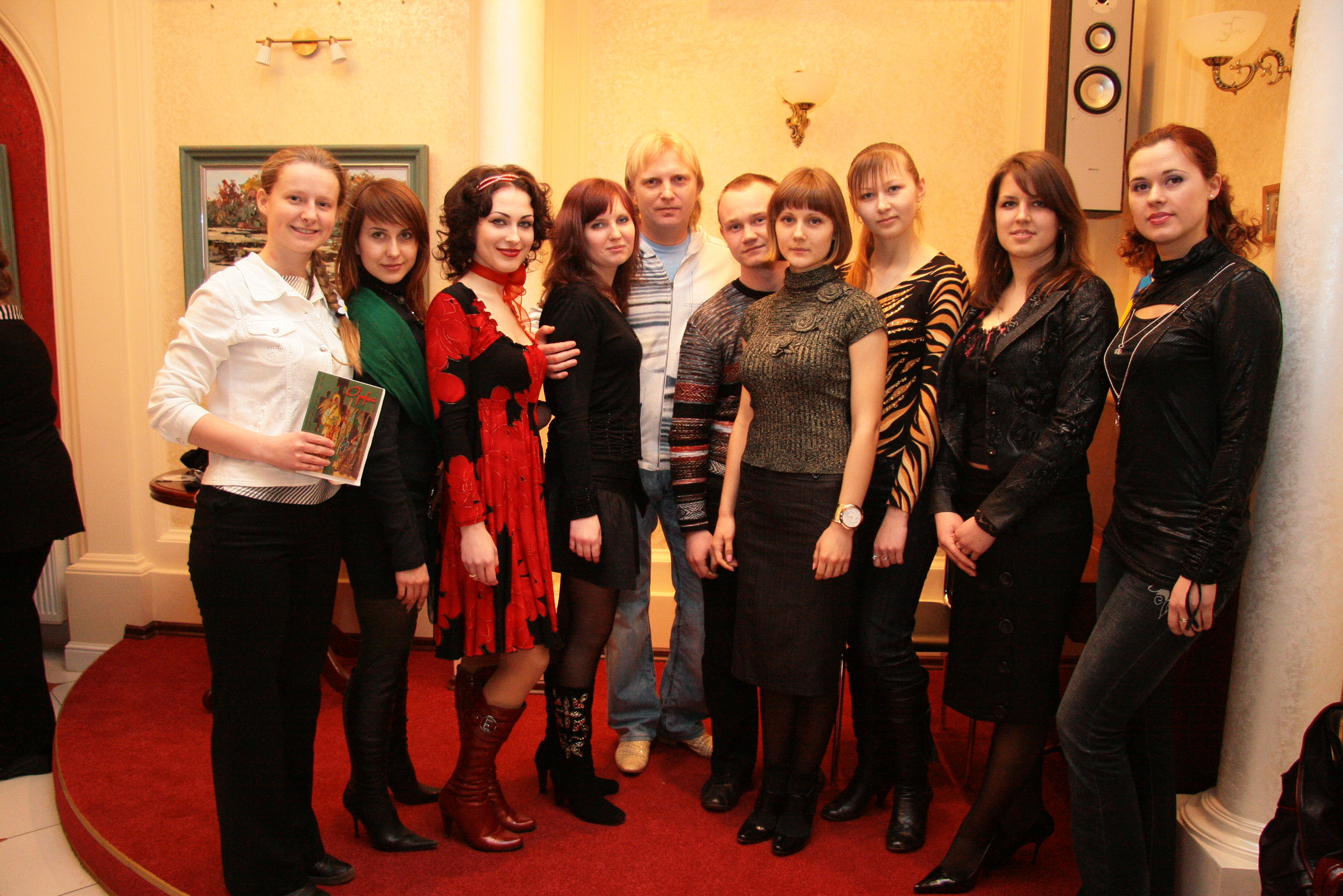 Орфей 2008